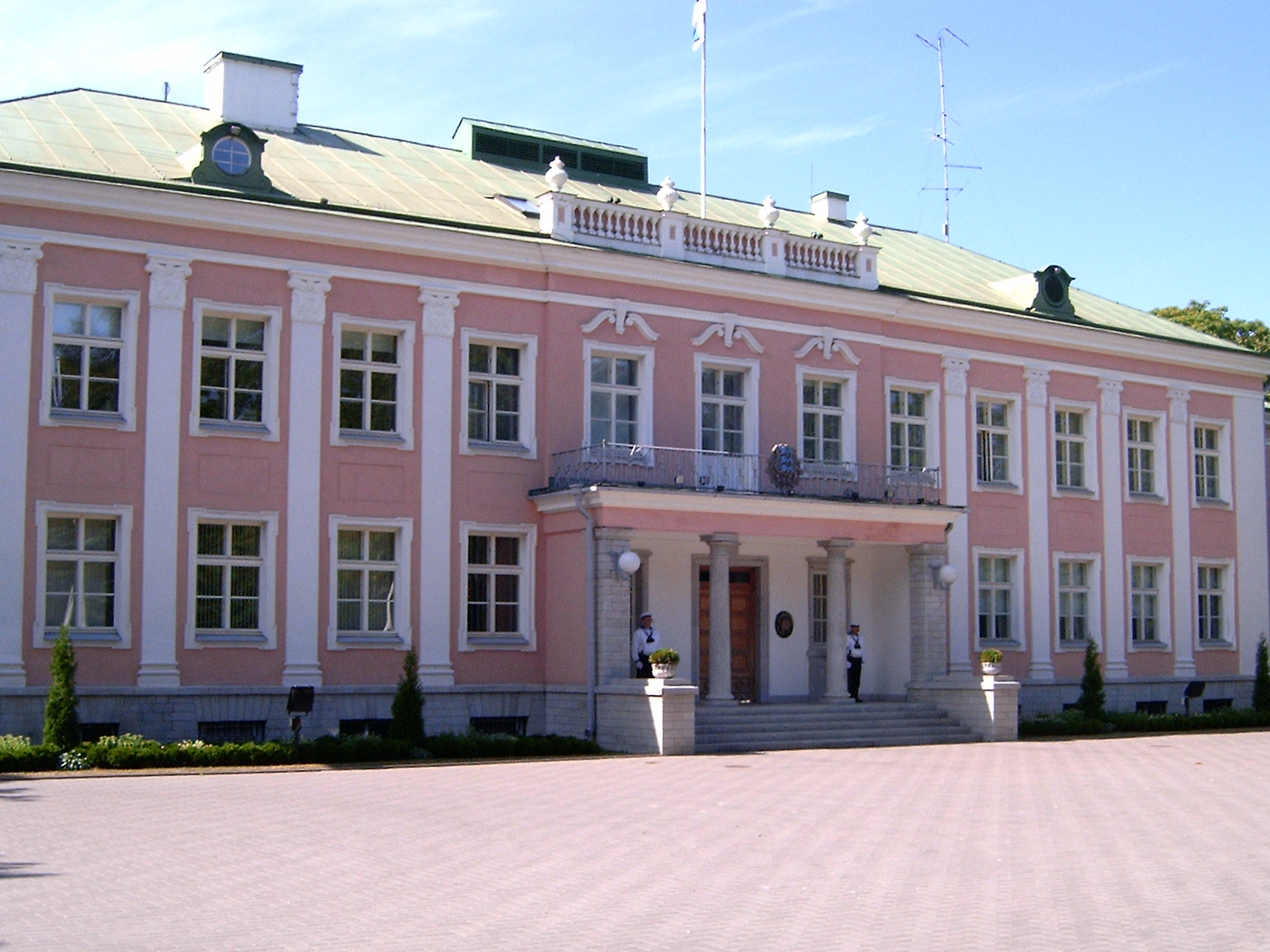 presidentieel paleis estland